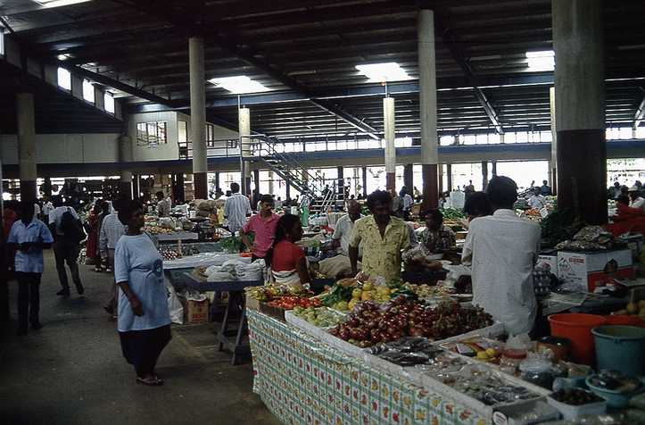 Markthalle Lautokas Sonstiges: Nikon F601